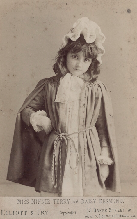 Minnie Terry as Daisy Desmond by Elliott & Fry albumen cabinet card, 5 3/4 in. x 4 1/8 in. (146 mm x 105 mm) image size Given by Terence Pepper, 2013 Photographs Collection NPG x138138